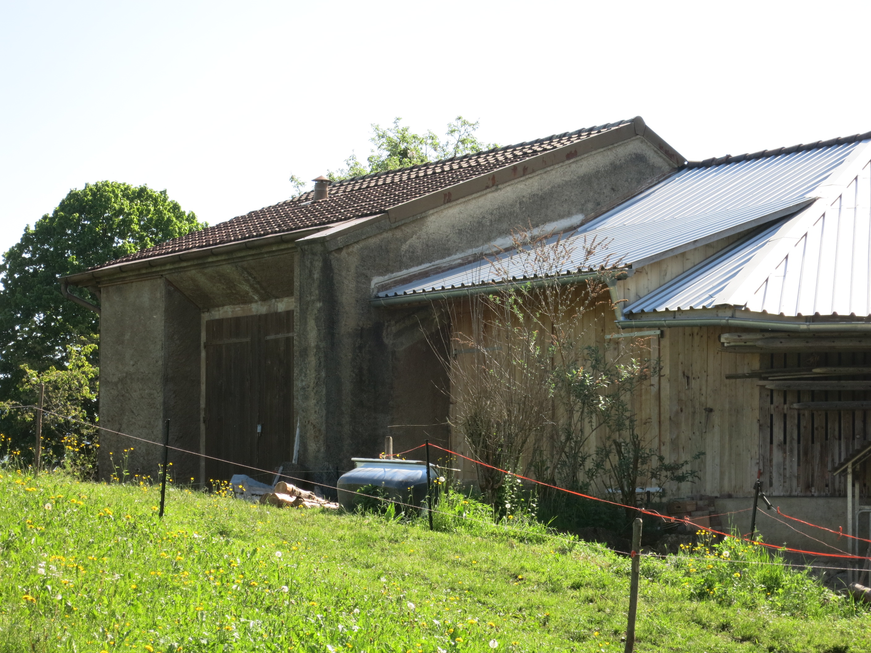 Artilleriewerk Krattigen BE, Schweiz